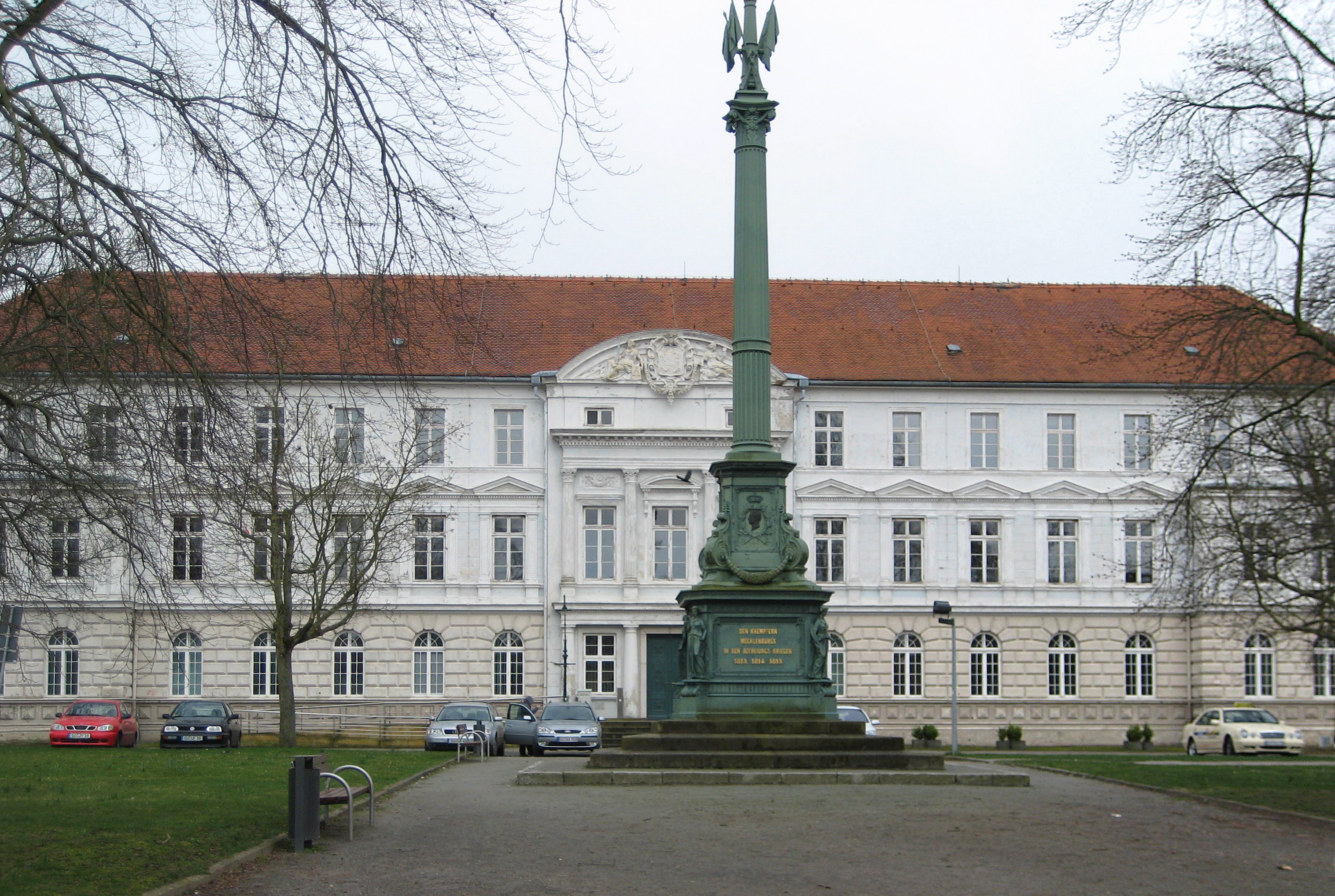 Amtsgericht, ehemalige Justizkanzlei Güstrow